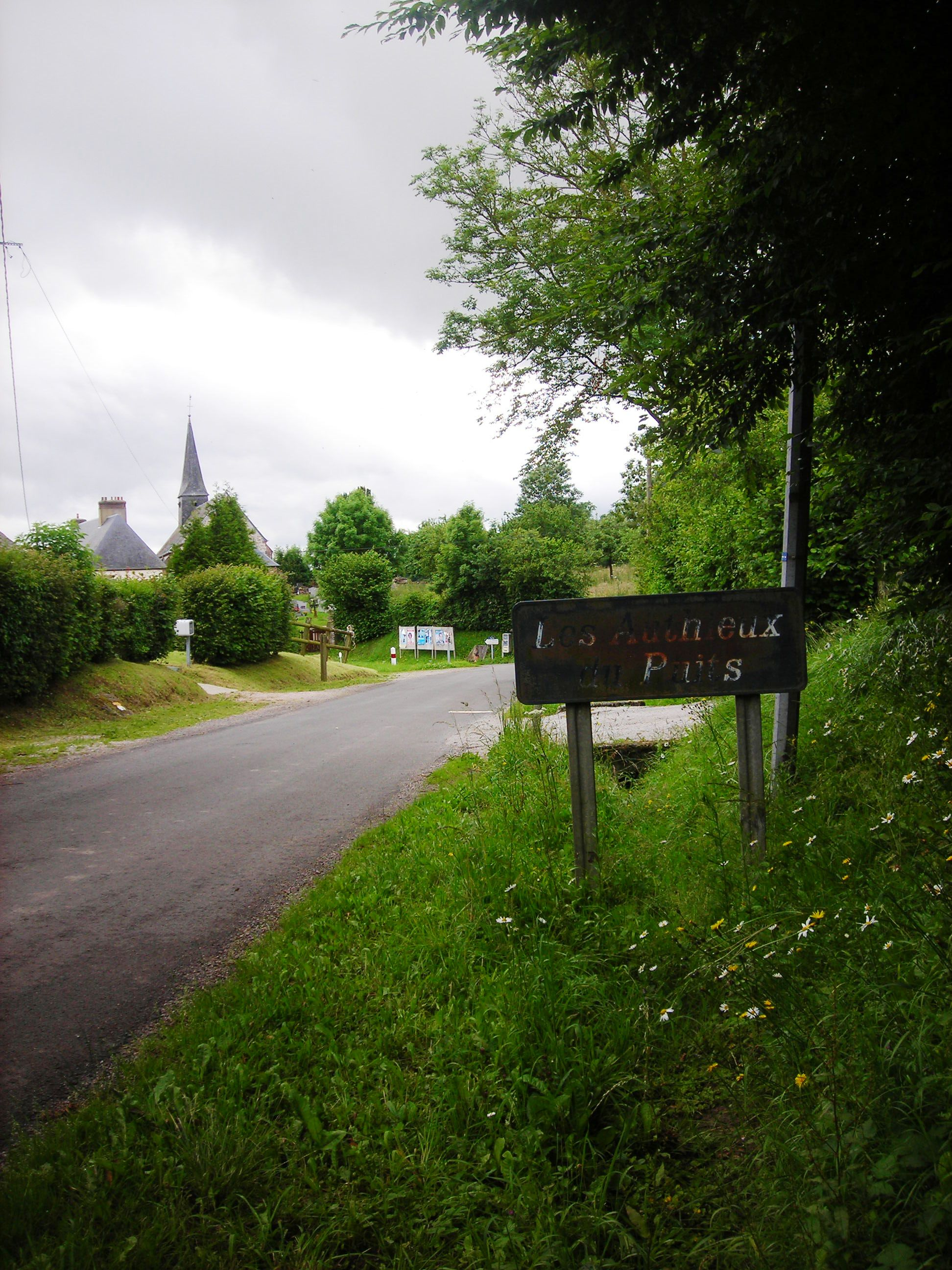 Entrée du village Les Authieux-du-Puits (Orne, France) avec ancien panneau.